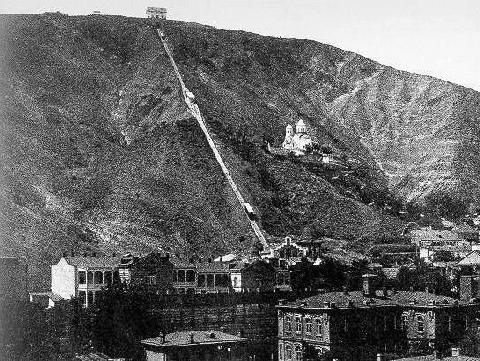 Beschreibung: Standseilbahn, Tiflis, Georgien, 1905